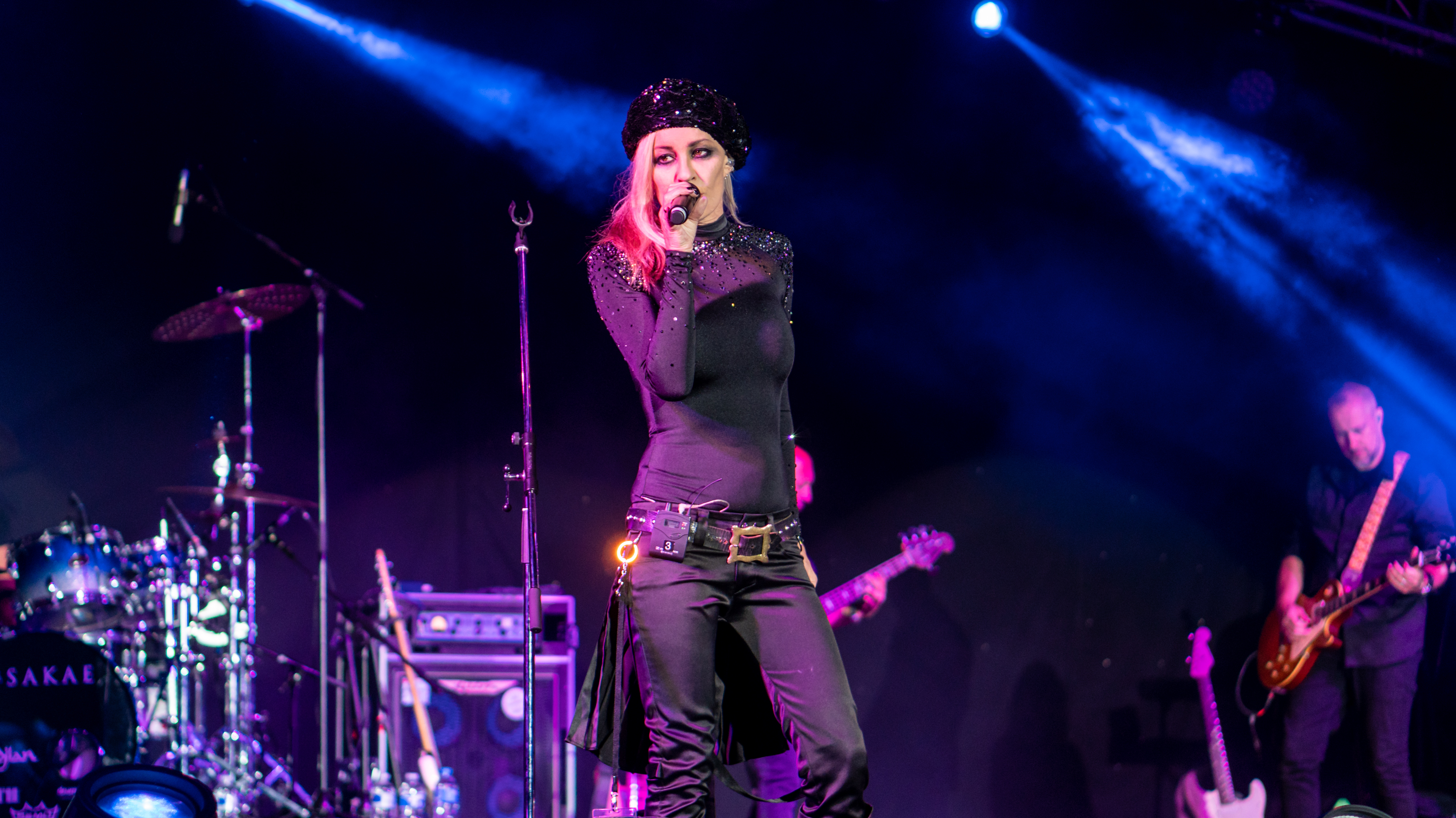 BanaRamaAmpthill290618-18